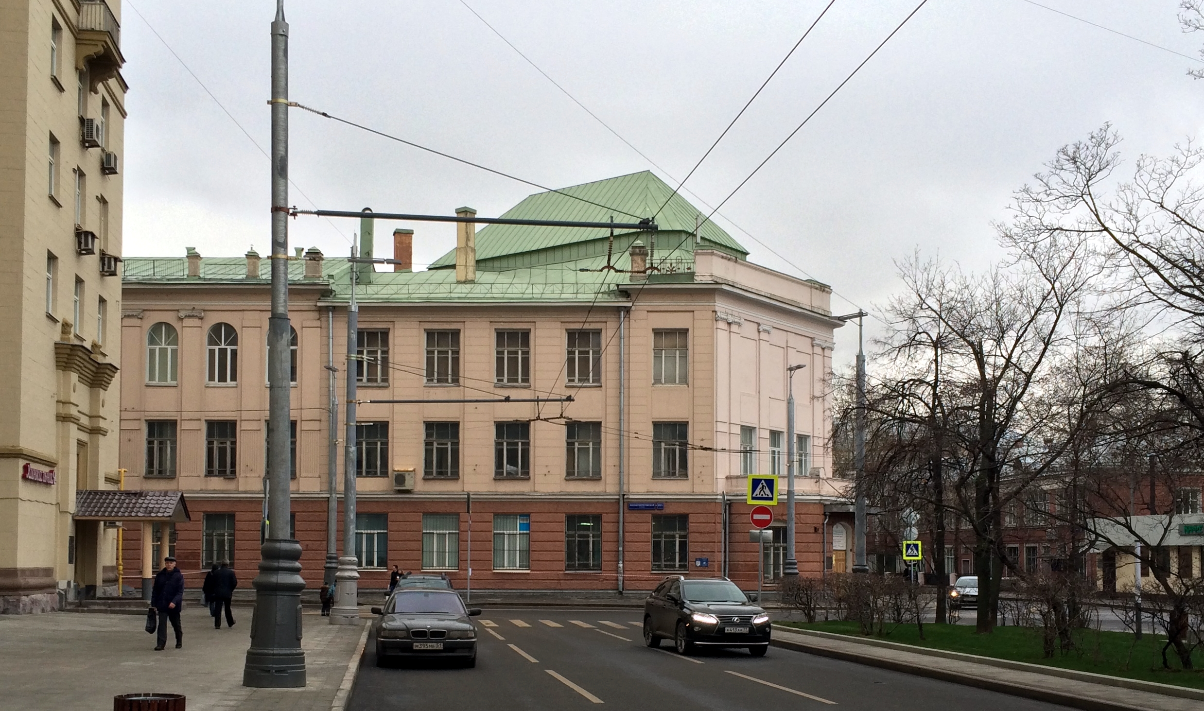 Институт физики, технологии и информационных систем МПГУ